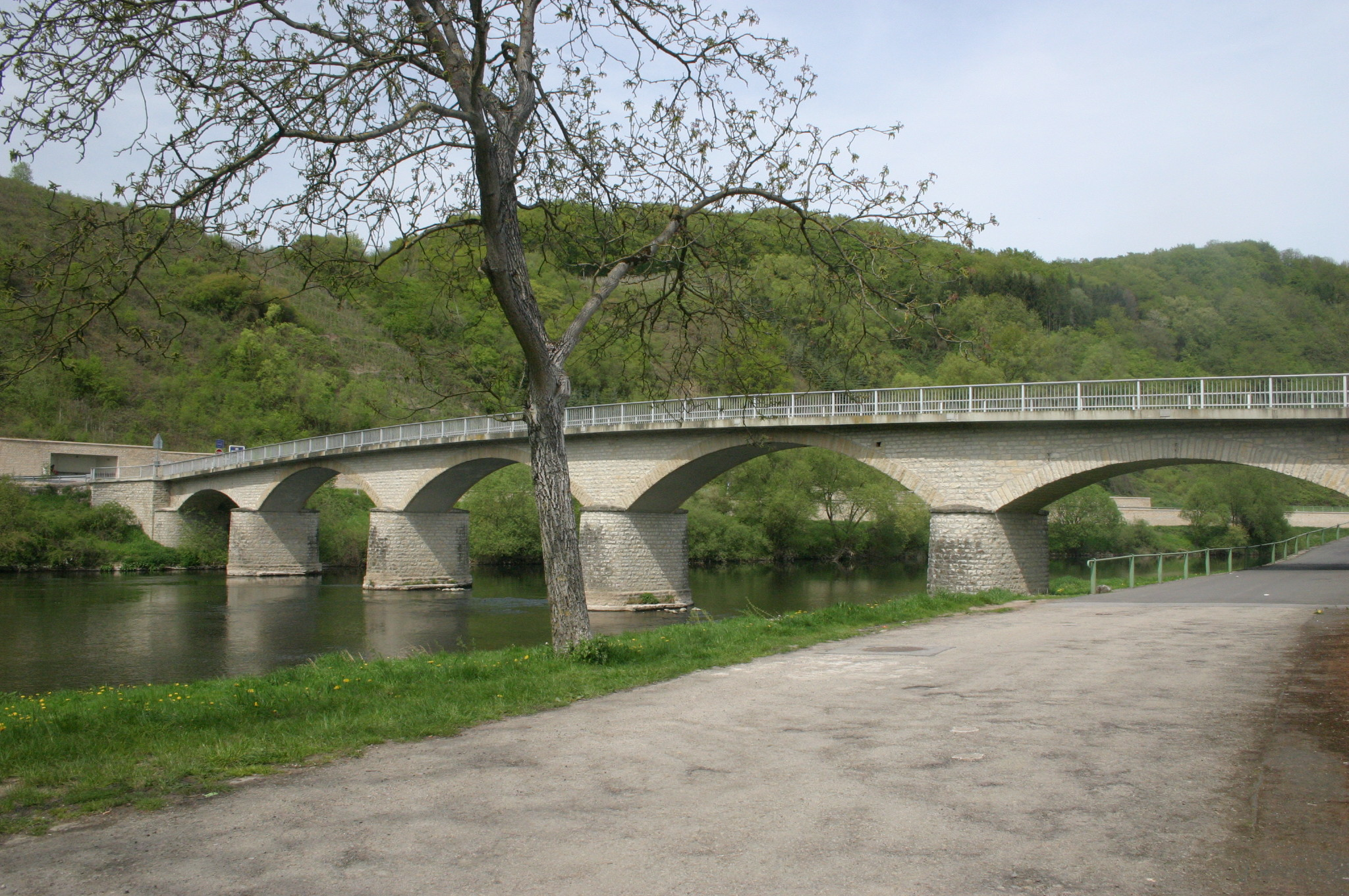 Bréck vu Laser. Bréck Laser Laser Laser Laser Laser Laser